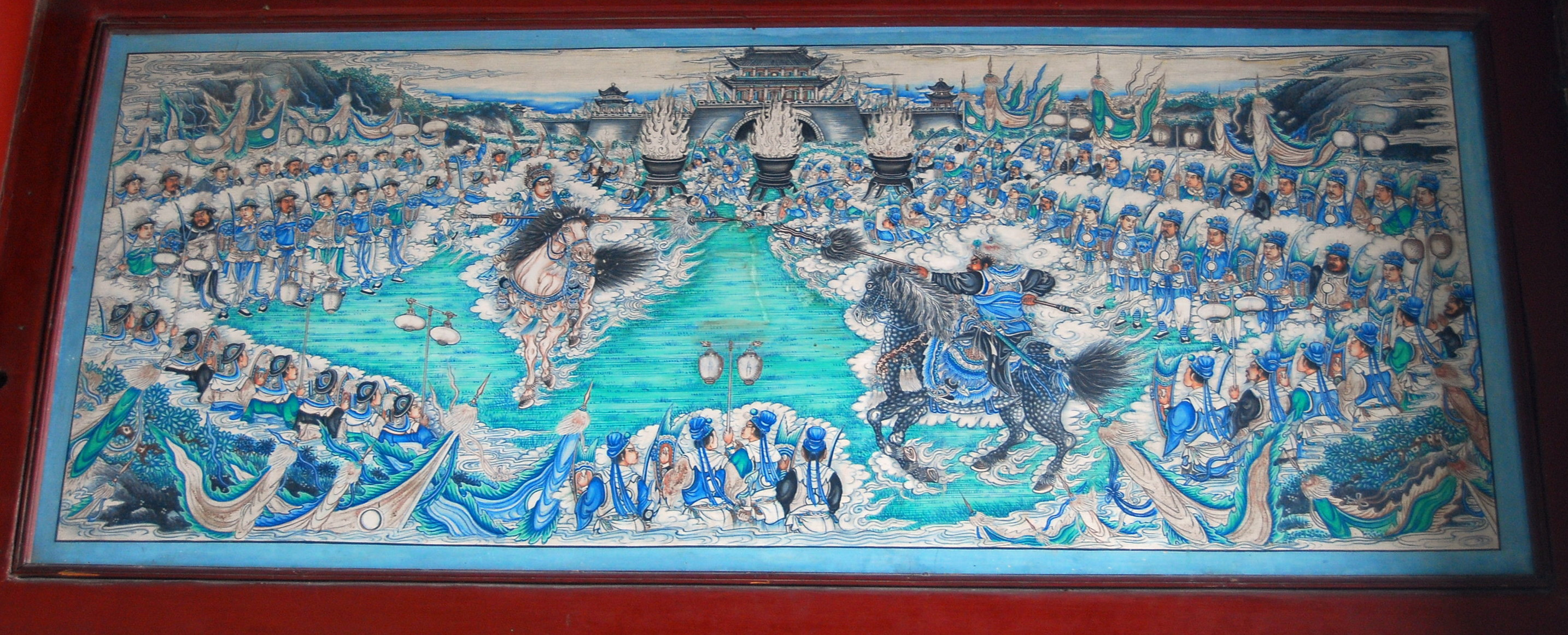 颐和园长廊上的彩绘：张飞夜战马超